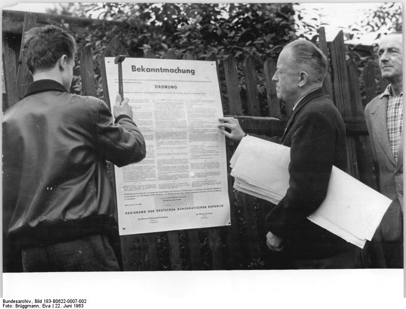 Zentralbild-Brüggmann Gal-Qu 22.6.1963 Zur Verordnung über Maßnahmen zum Schutze der Staatsgrenze Mit Verständnis und Zustimmung hat die Berliner Bevölkerung die neuen Schutzmaßnahmen an der Staatsgrenze aufgenommen. UBz.Ehrenamtliche Helfer vom Rat des Stadtbezirks Berlin-Treptow, beim Anbringen der Verordnung über Maßnahmen zum Schutze der Staatsgrenze zwischen der DDR und Westberlin im Stadtbezirk Treptow.